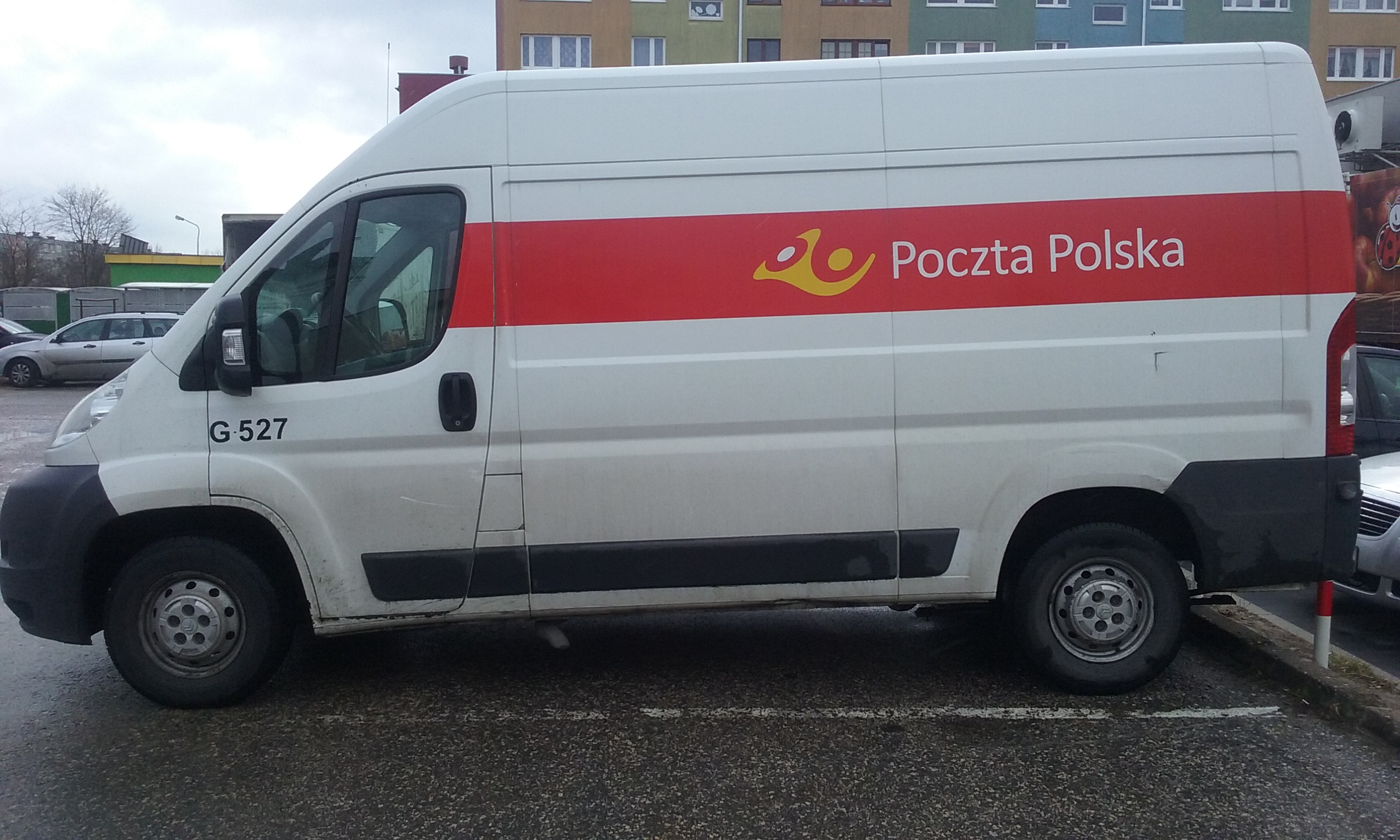 Samochód pocztowy Poczty Polskiej w 60-tysięcznym Tomaszowie Mazowieckim, w województwie łódzkim